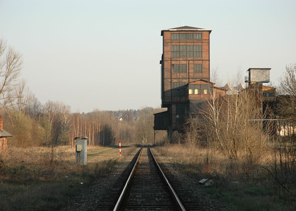 Báňská dráha (The Mine Railway) at former station Michálkovice, Ostrava, Czech Republic